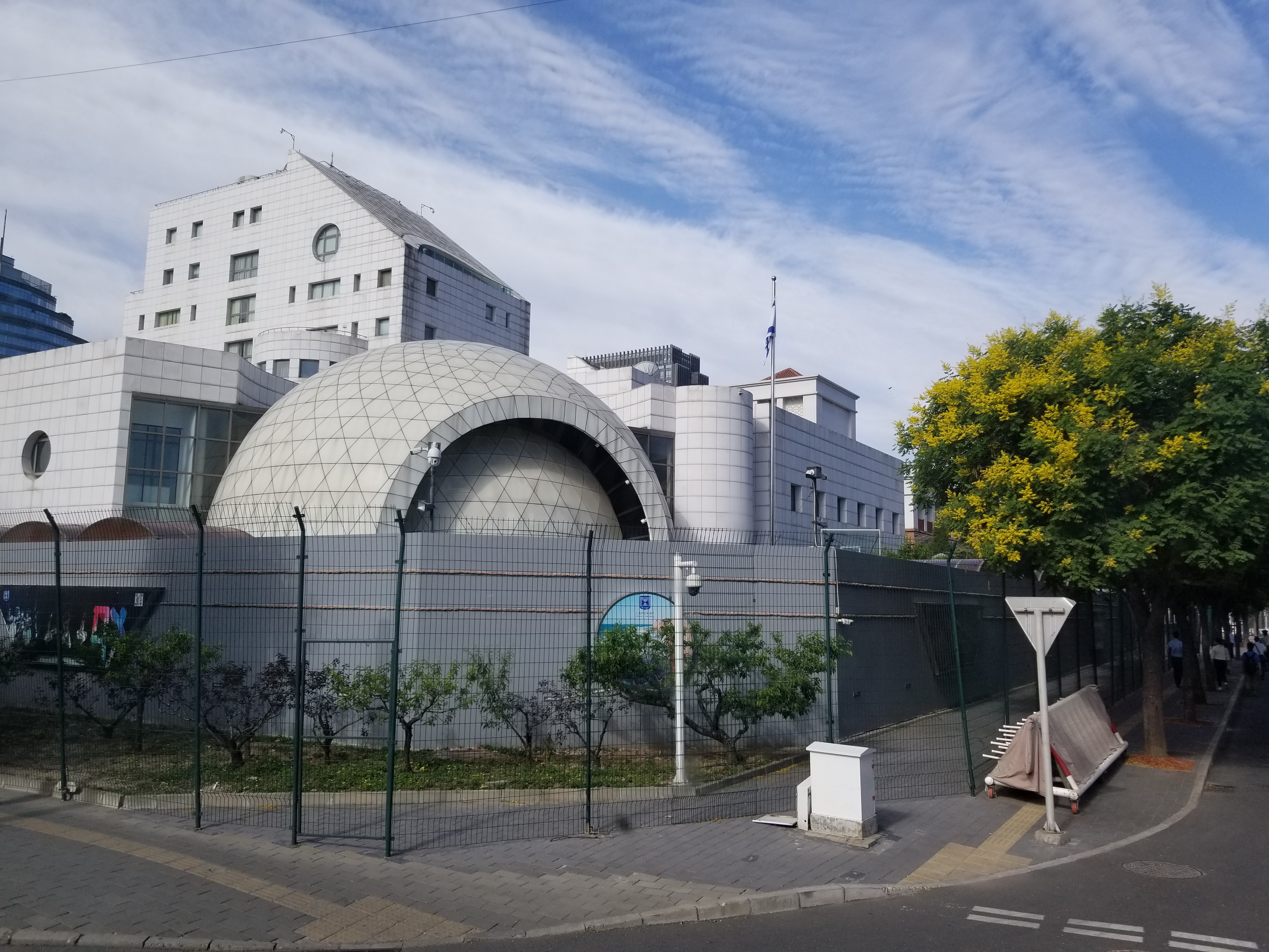 שגרירות ישראל בבייג'ינג